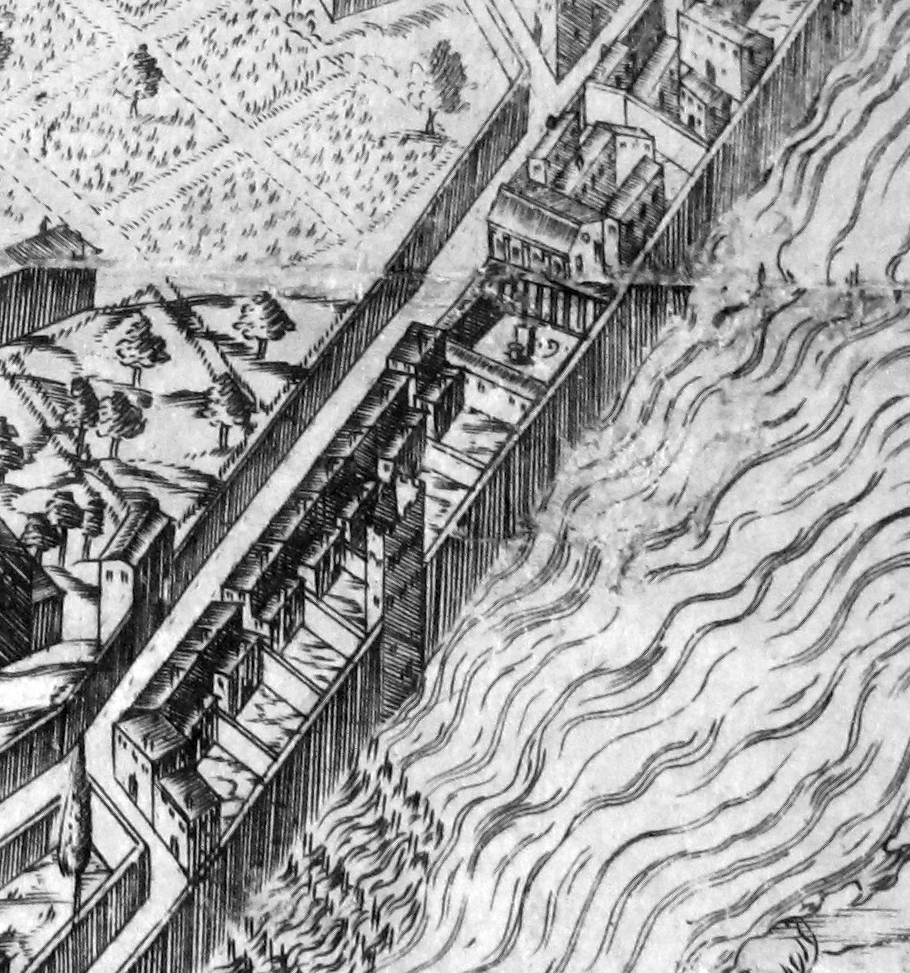 Pianta del buonsignori, dettaglio 009 abbandonate (ospedale dei Santi Filippo e Jacopo) 2